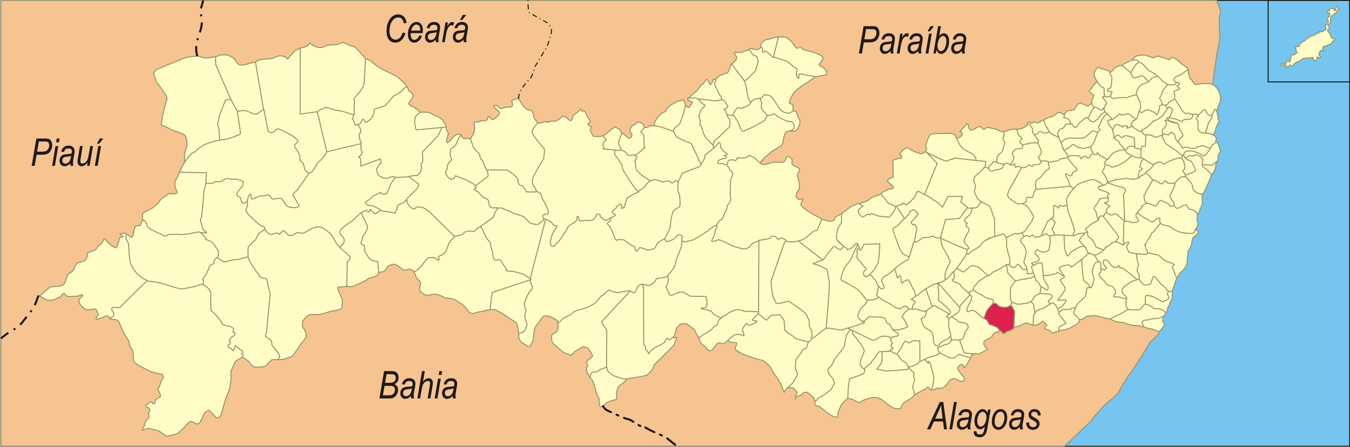 Localização da cidade no estado de Pernambuco